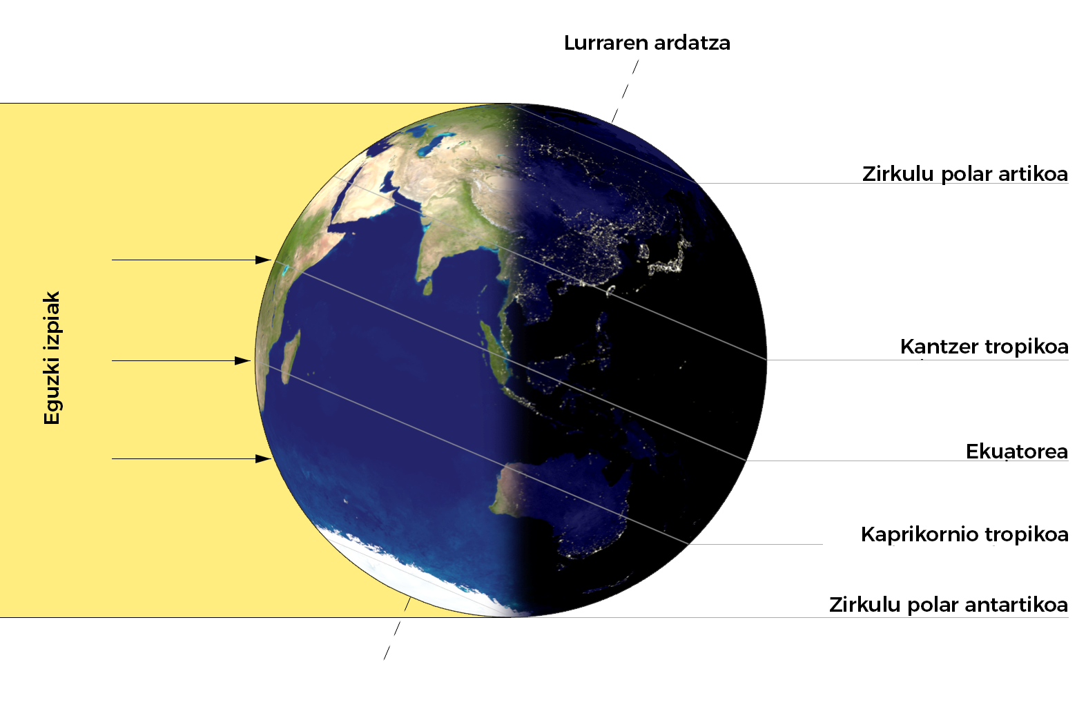 Neguko solstizioa Ipar Hemisferioan